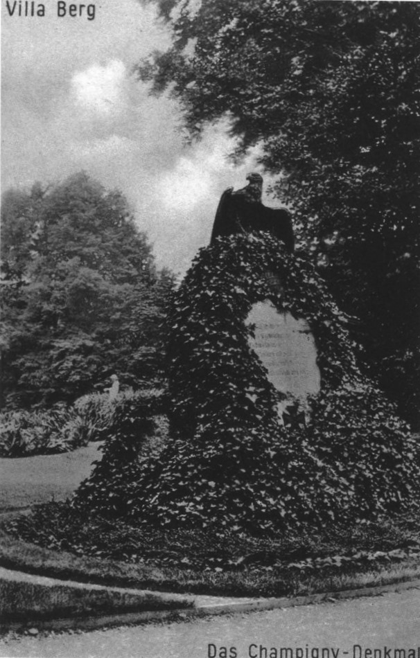 Stuttgart, Villa Berg, Park, Champigny-Denkmal, um 1930.